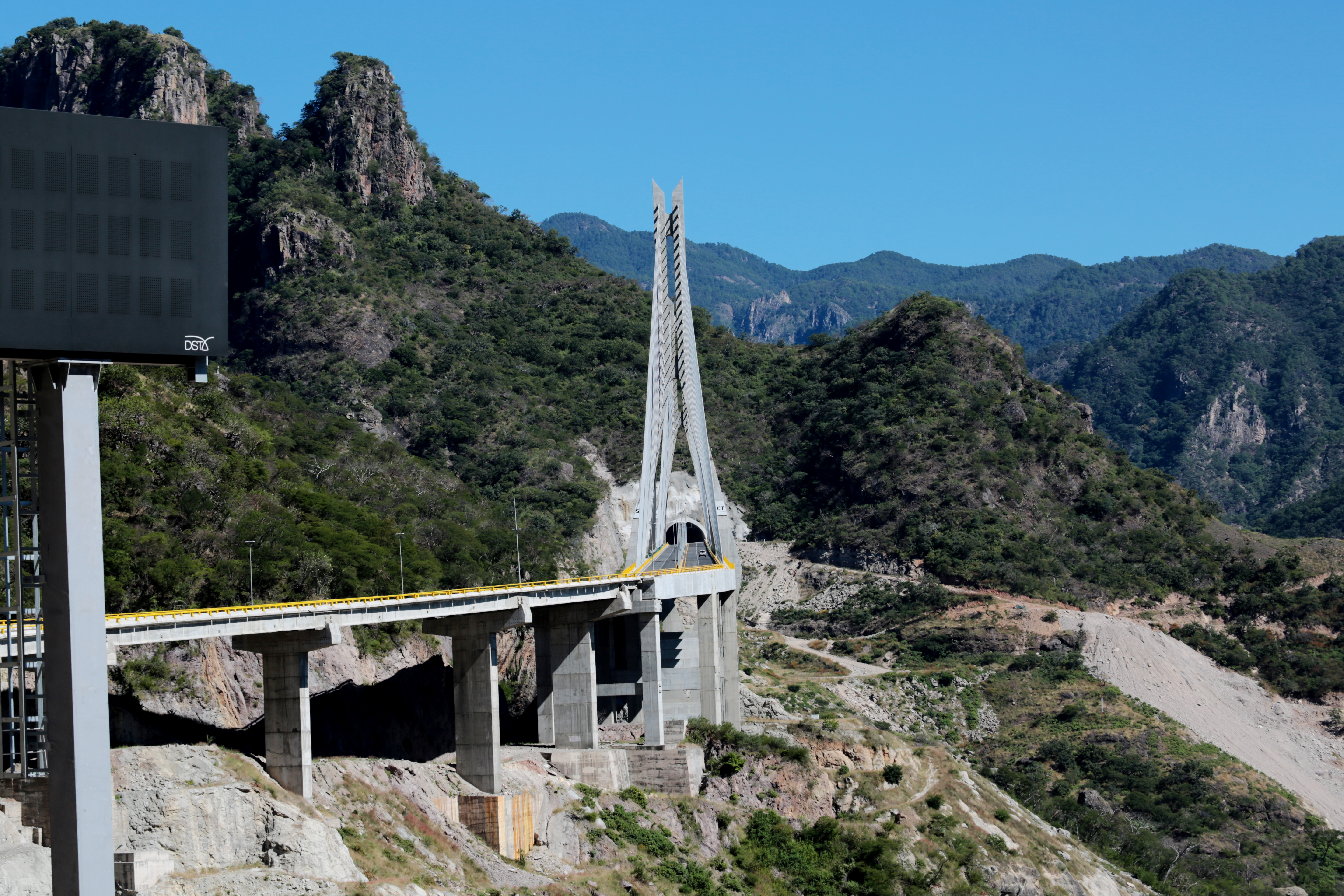 Puente Baluarte, Sinaloa, Mexico.